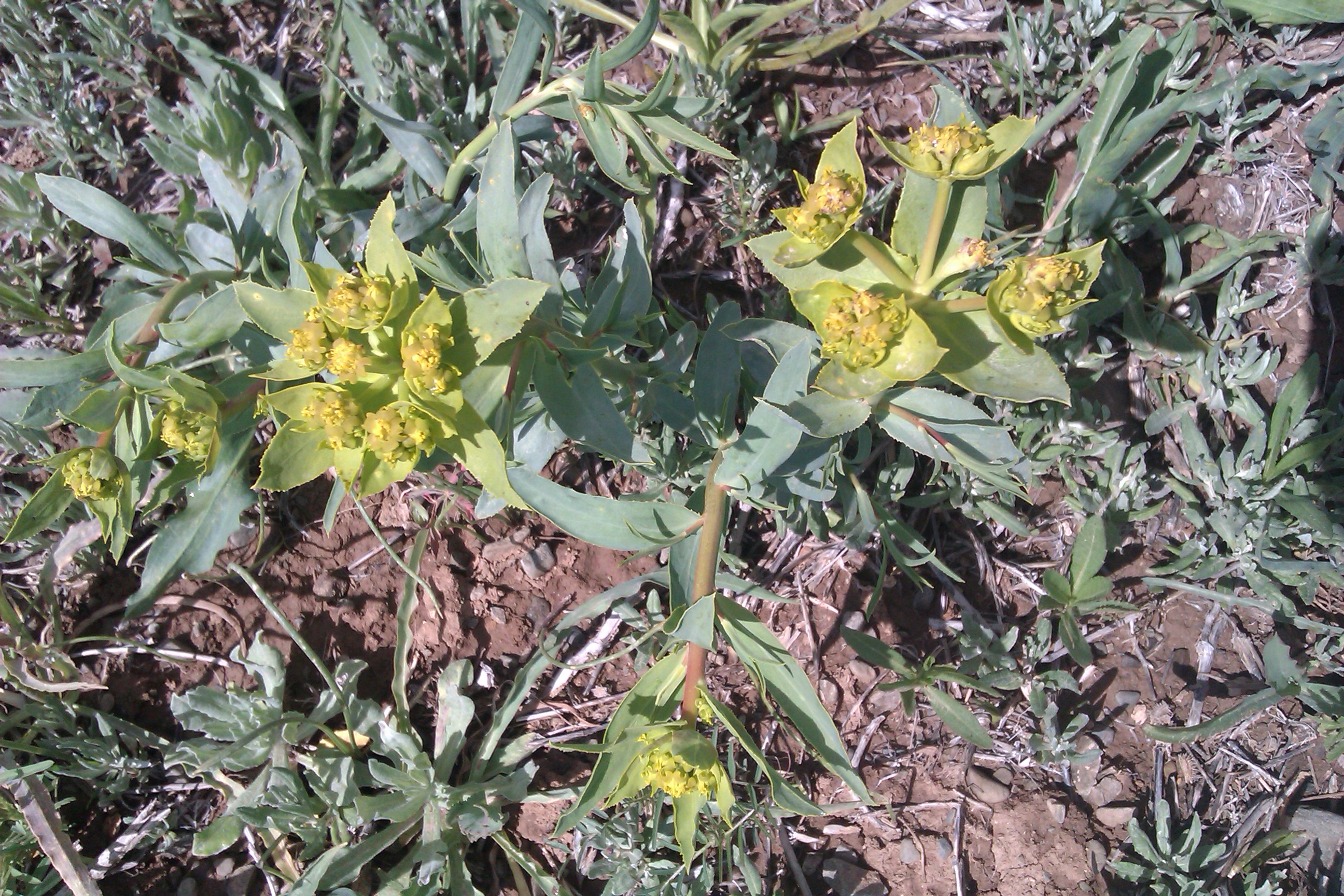 گونه های گیاهی روستای ییلاقی فرج آباد